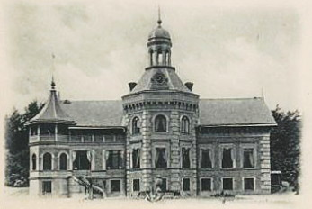 Edsby slott före ombyggnaden, 1902